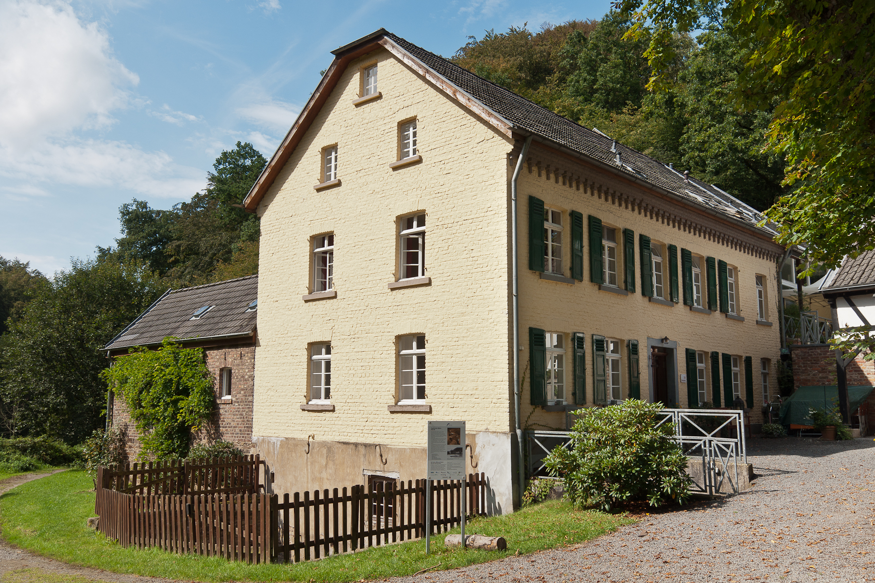 Rösrath, Denkmalnummer 63, KUpfersiefen 31 (Kupfersiefer Mühle)